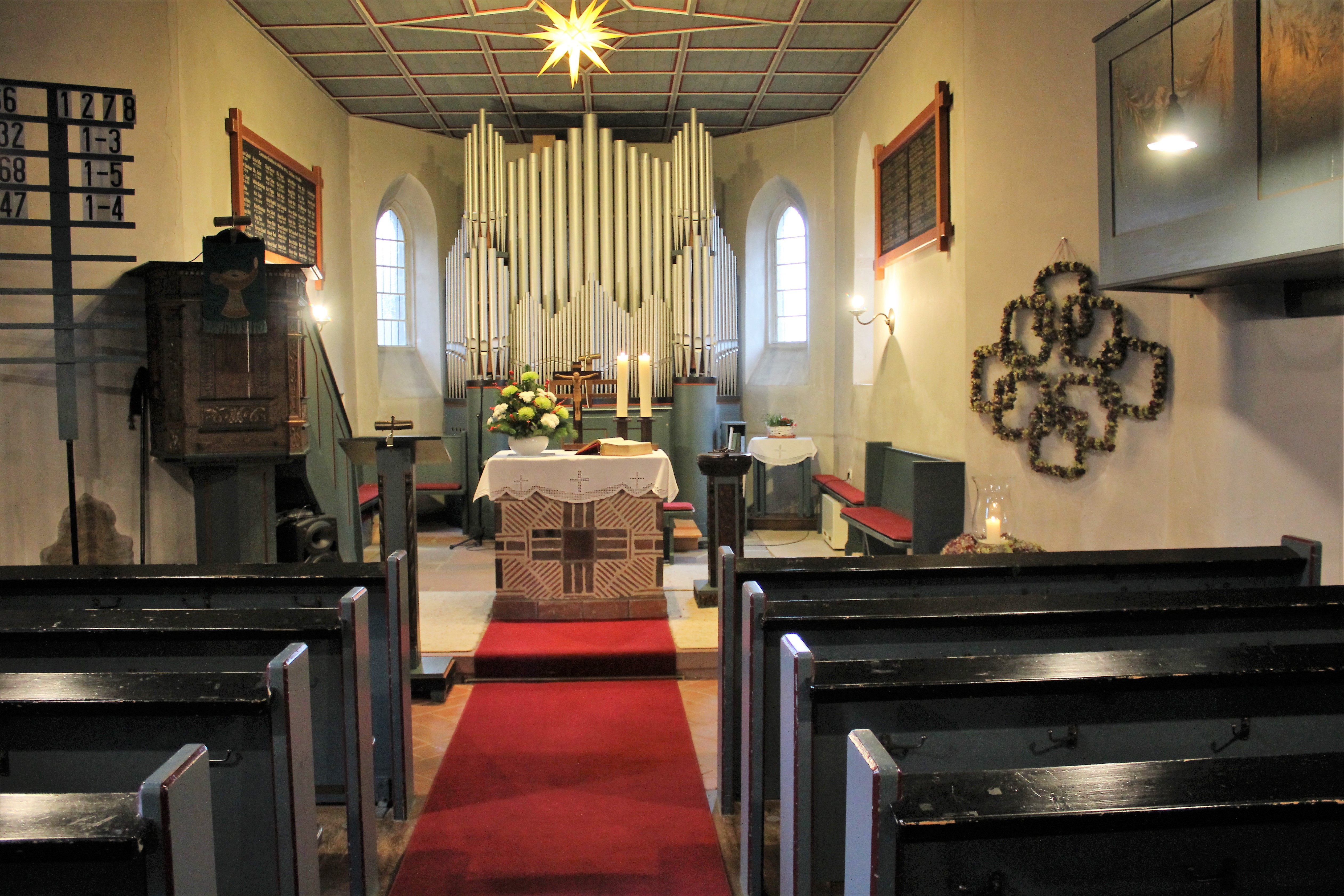 Evangelische Kirche Flensungen, Gemeinde Mücke, Vogelsbergkreis, Hessen, Deutschland